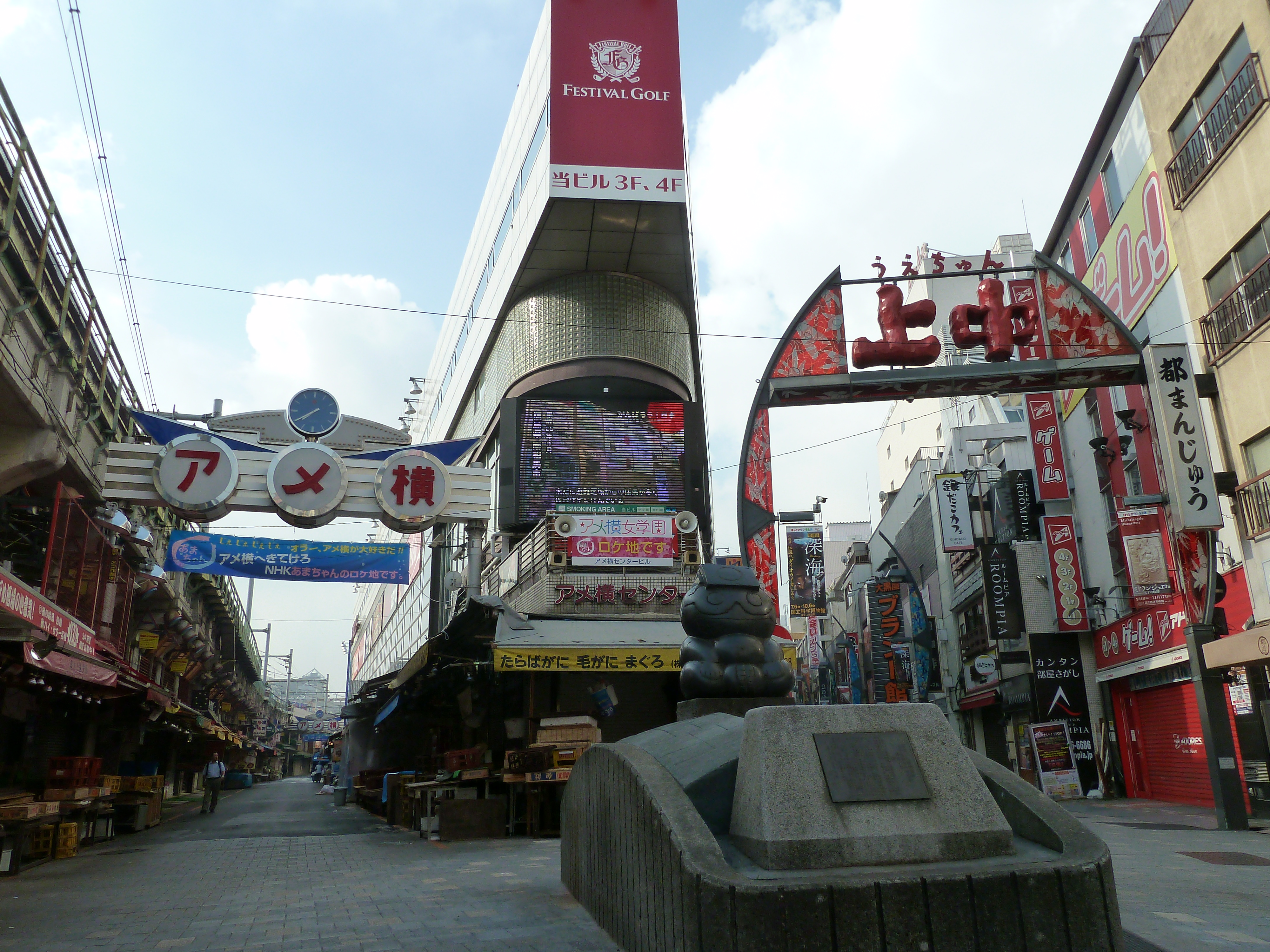 american village / 上野アメ横